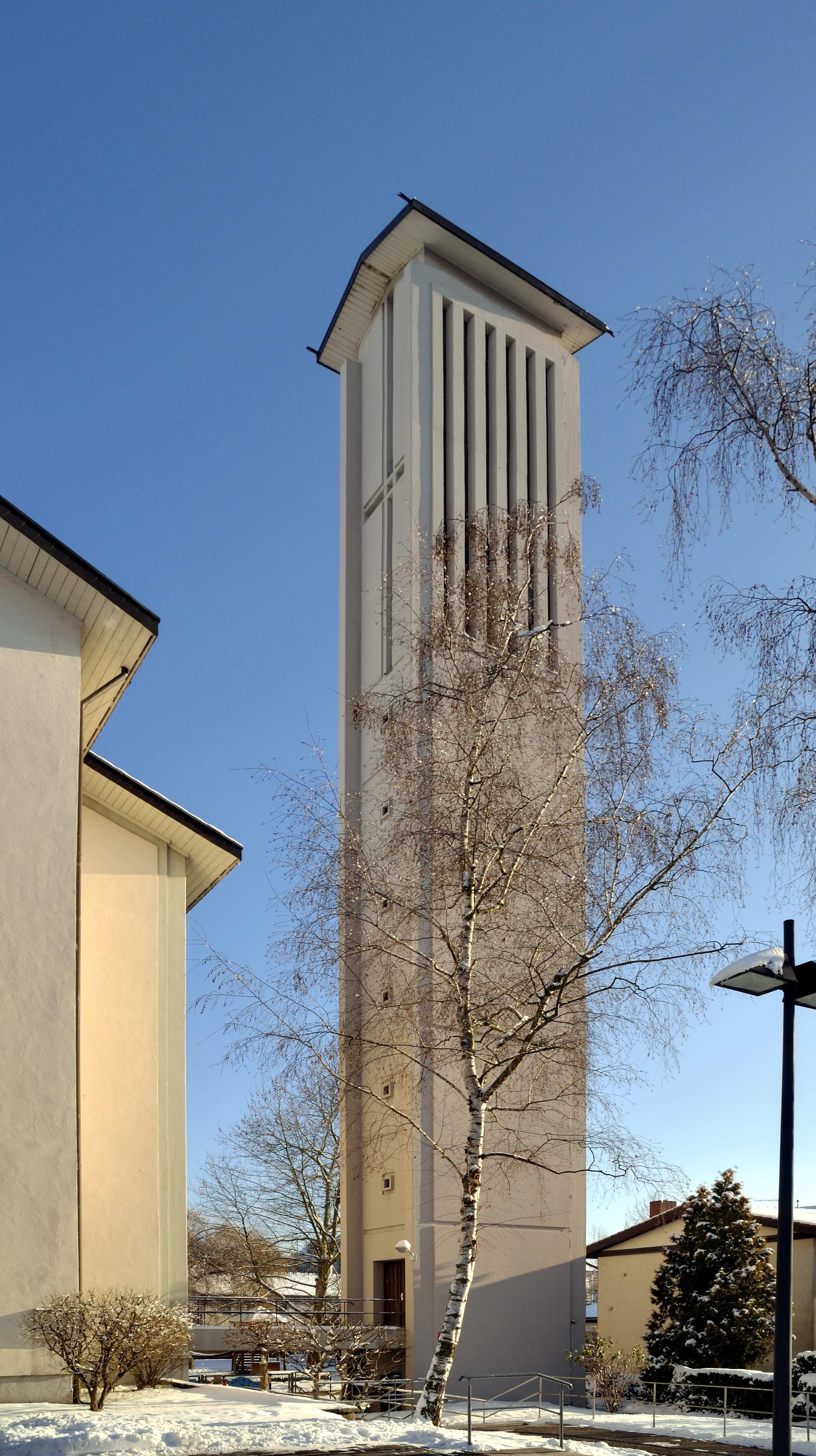 Weil am Rhein: Pfarrkirche Guter Hirte